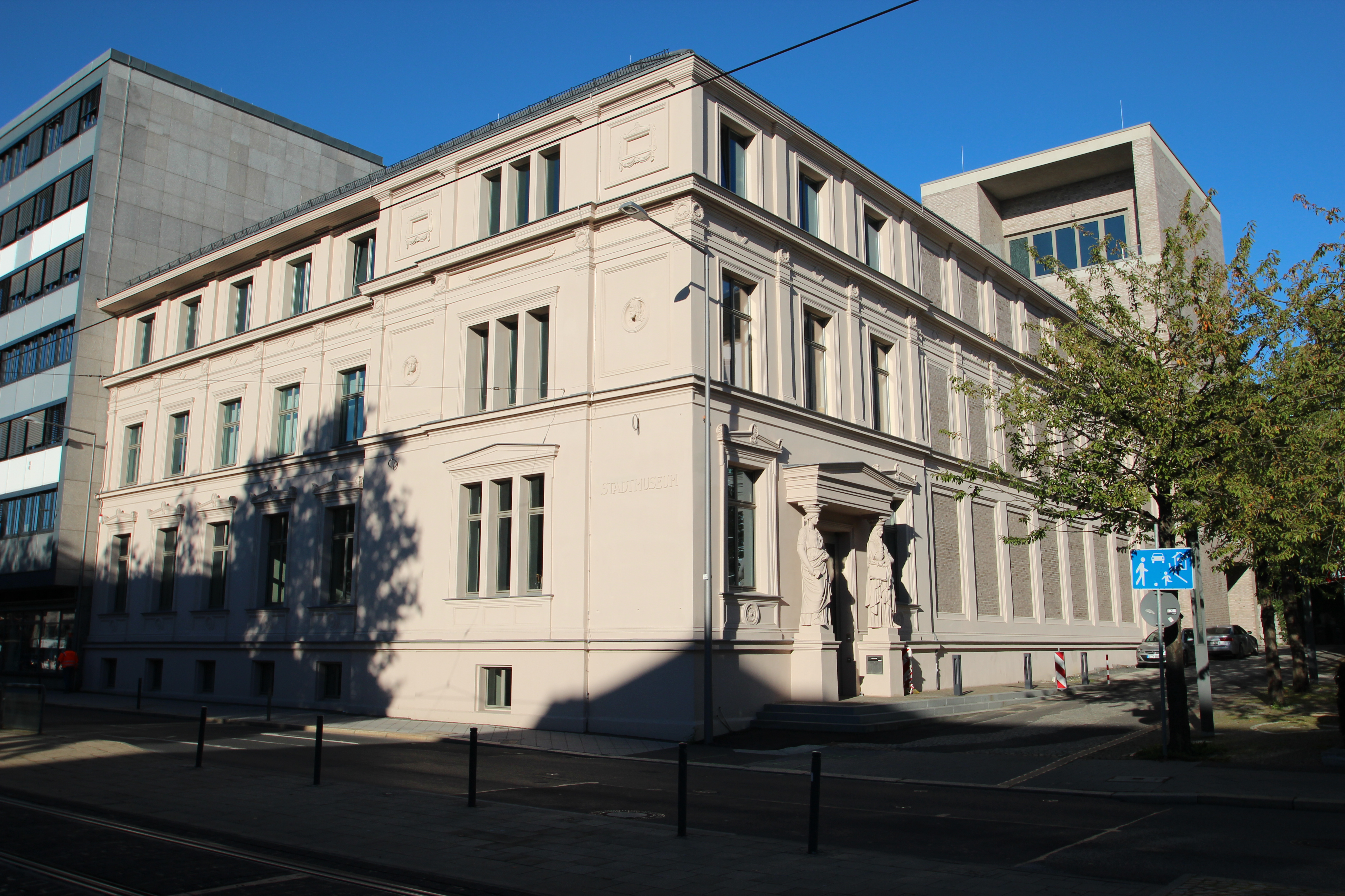 Stadtmuseum Kassel / Kulturhaus, Ständeplatz 16 in Kassel